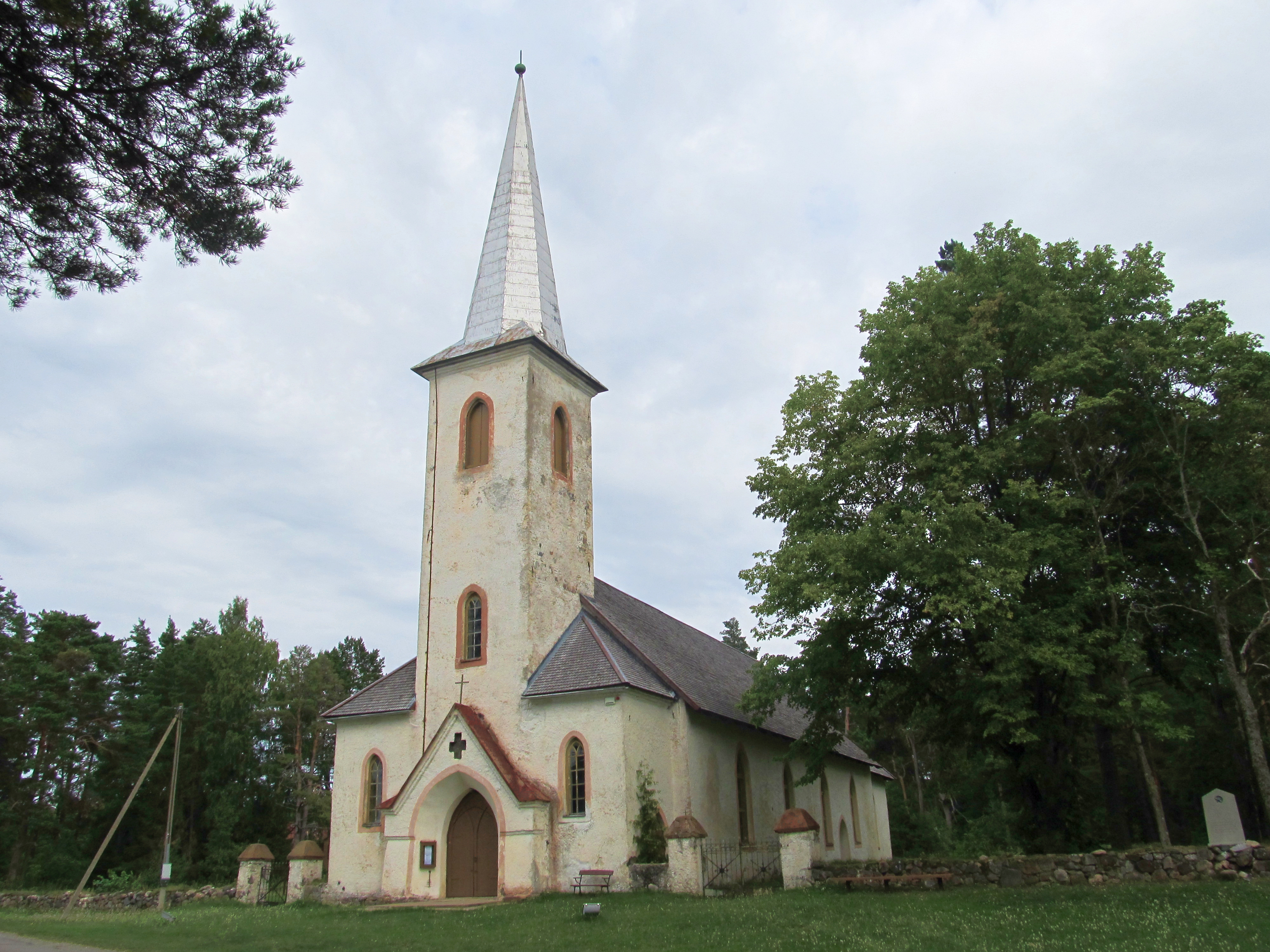 Varbla kirik